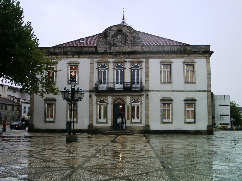 Vila Verde library. Portugal.